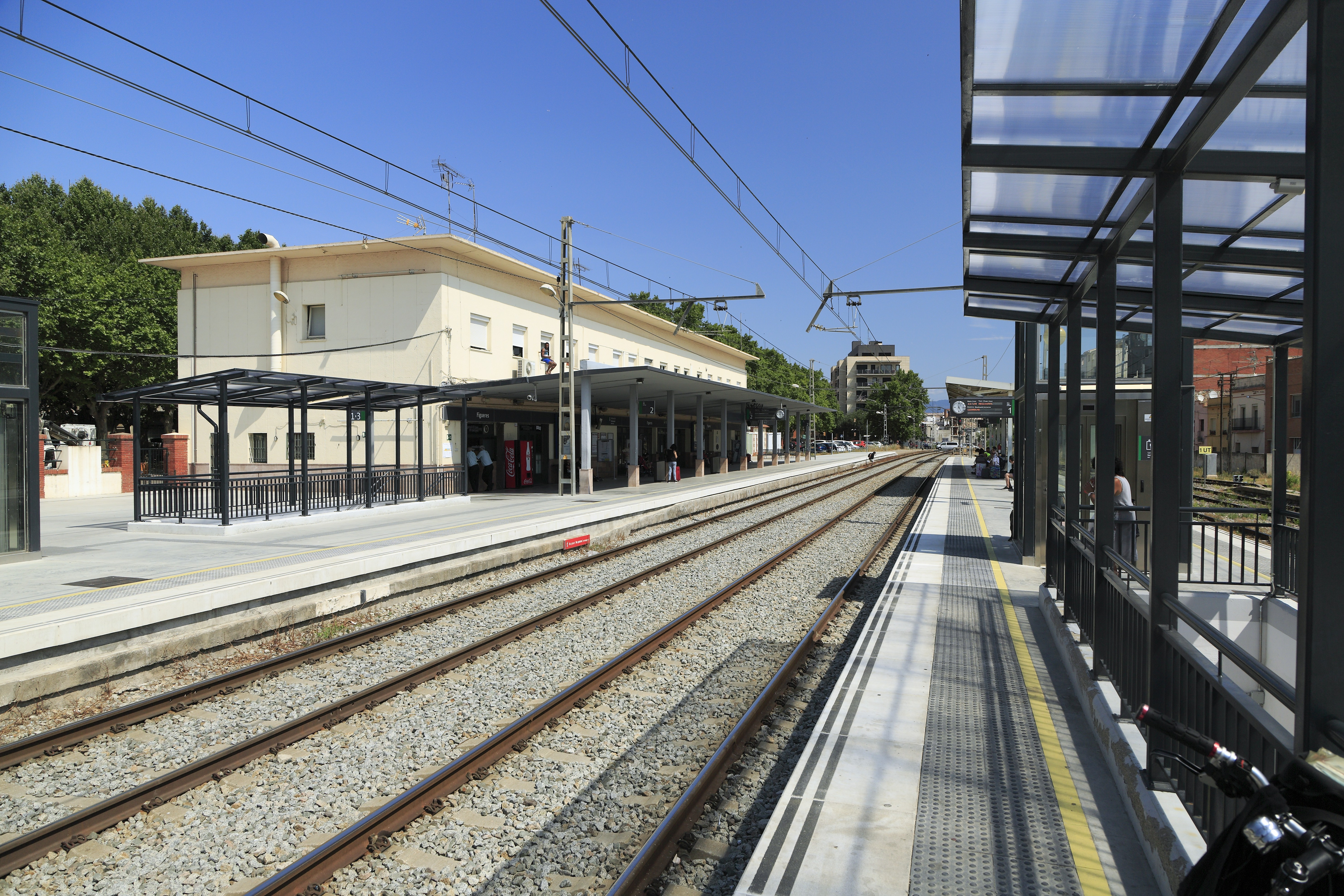 An der breitspurigen Altbaustrecke Barcelona–Cerbère, baulich hat sich hier durch die Inbetriebnahme der Regelspurstrecke zwischen Barcelona und Perpignan nicht viel geändert. Nur die Fernverkehrsverbindungen sind seitdem entfallen, außerdem wurden die Bahnsteige auf 550 Millimeter über SO erhöht.Richtung Cerbère, in beiden Stammgleisen wurden umspurbare Schwellen eingebaut. Von konkreten Umspurabsichten ist jedoch nichts bekannt.